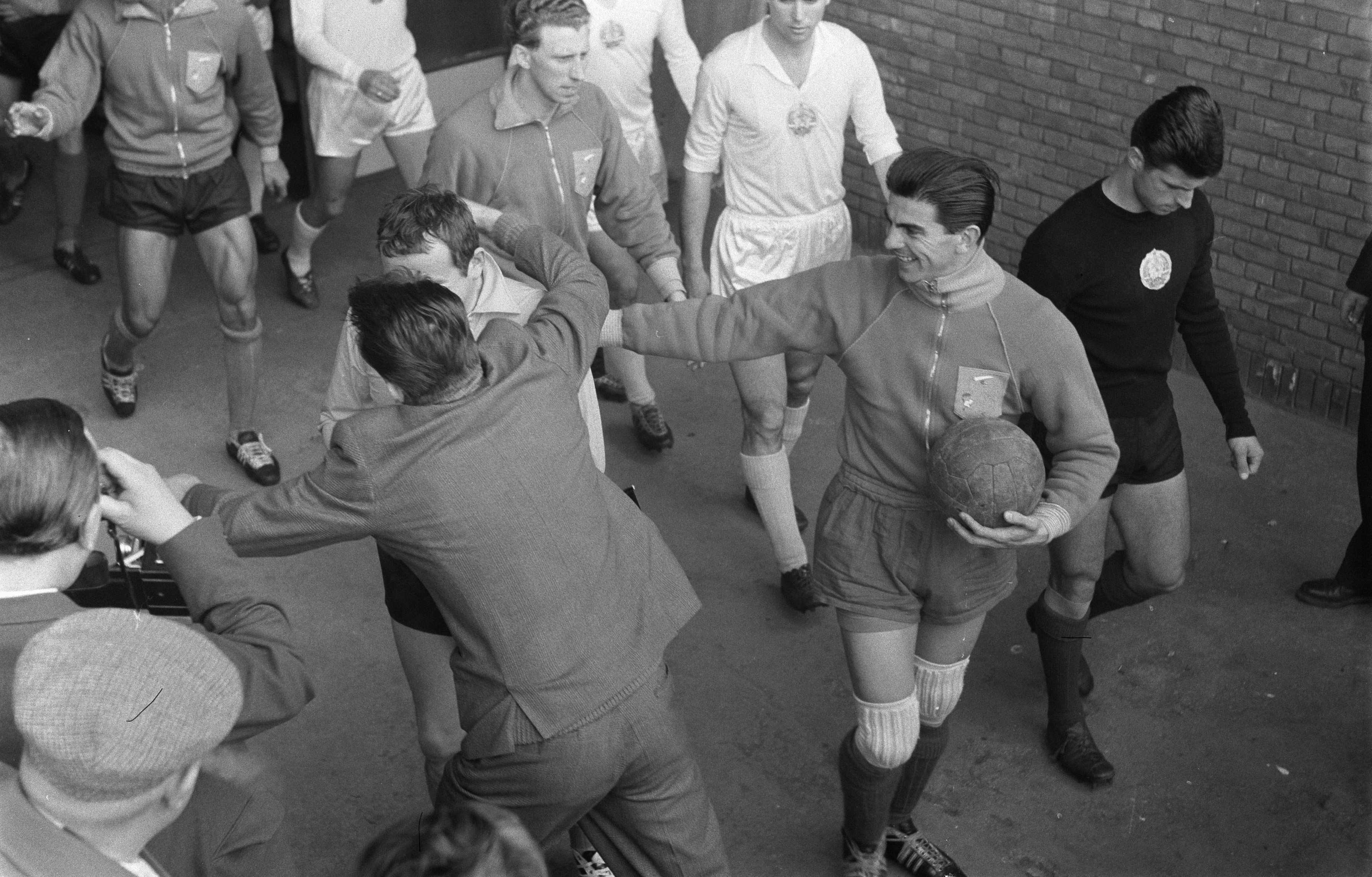 Collectie / Archief : Fotocollectie Anefo Reportage / Serie : [ onbekend ] Beschrijving : Nederland tegen Bulgarije 4-2 in het Olympisch Stadion spelers worden gehuldigd Datum : 3 april 1960 Locatie : Bulgarije, Nederland Trefwoorden : SPELERS Instellingsnaam : Olympisch Stadion Fotograaf : Pot, Harry / Anefo Auteursrechthebbende : Nationaal Archief Materiaalsoort : Negatief (zwart/wit) Nummer archiefinventaris : bekijk toegang 2.24.01.05 Bestanddeelnummer : 911-1434